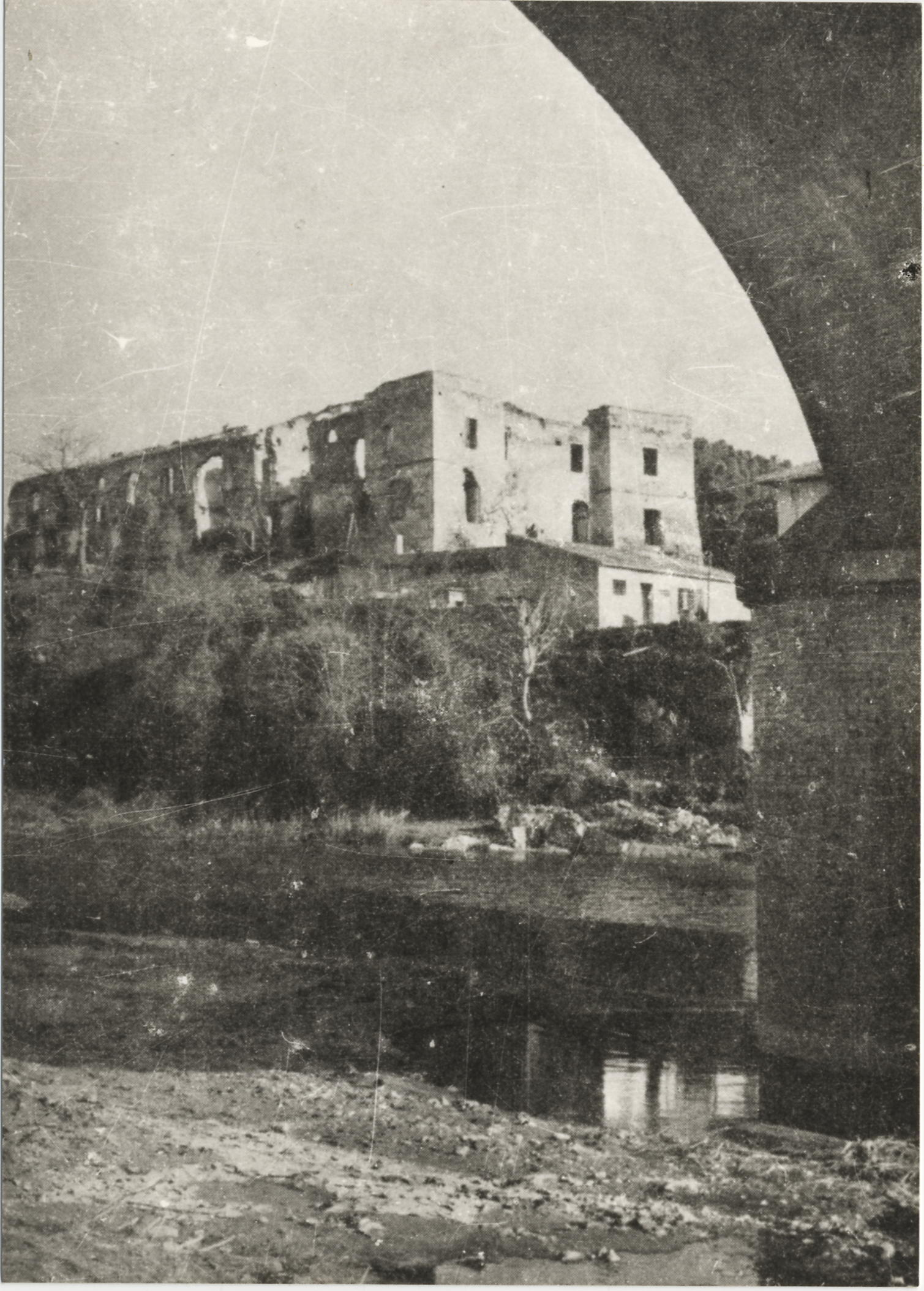 Castello del Fitto di Cecina poco prima della demolizione deliberata dalla Giunta Comunale il 13 gennaio 1964